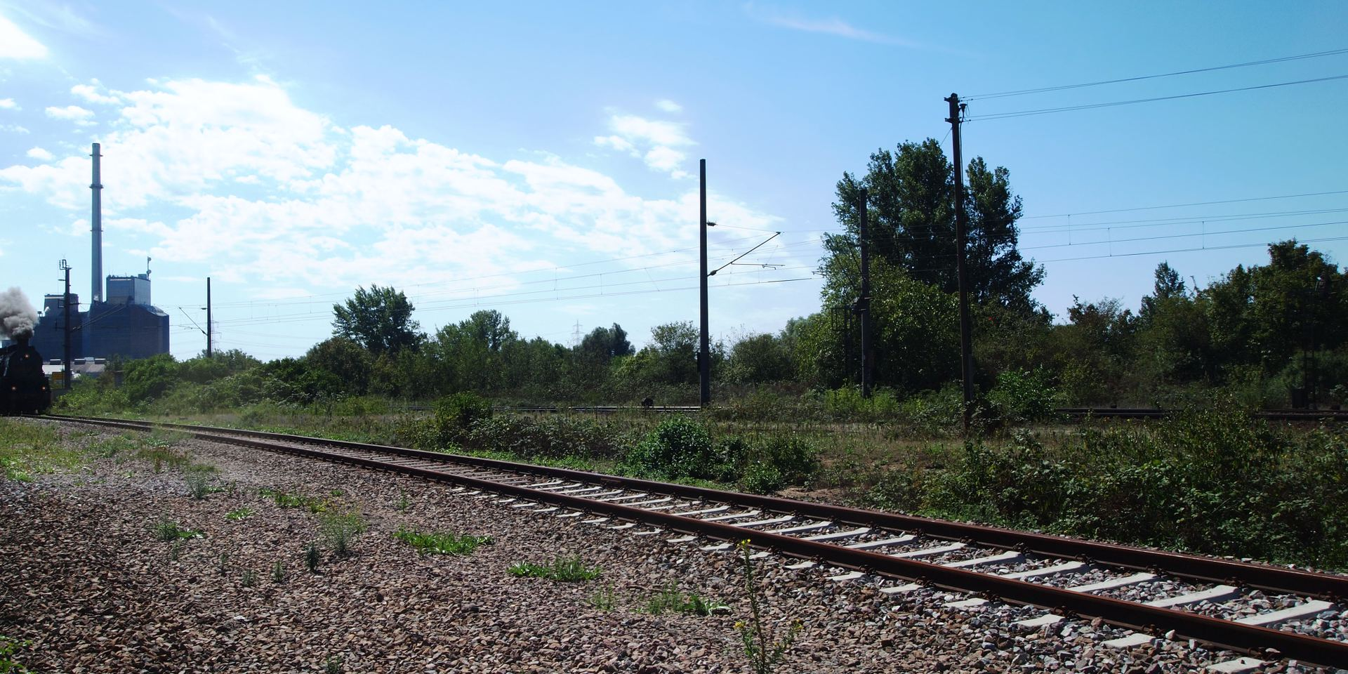 Abzweigung der Hardtbahn von der Maxaubahn. Links 58 311 und das städtische Heizkraftwerk.